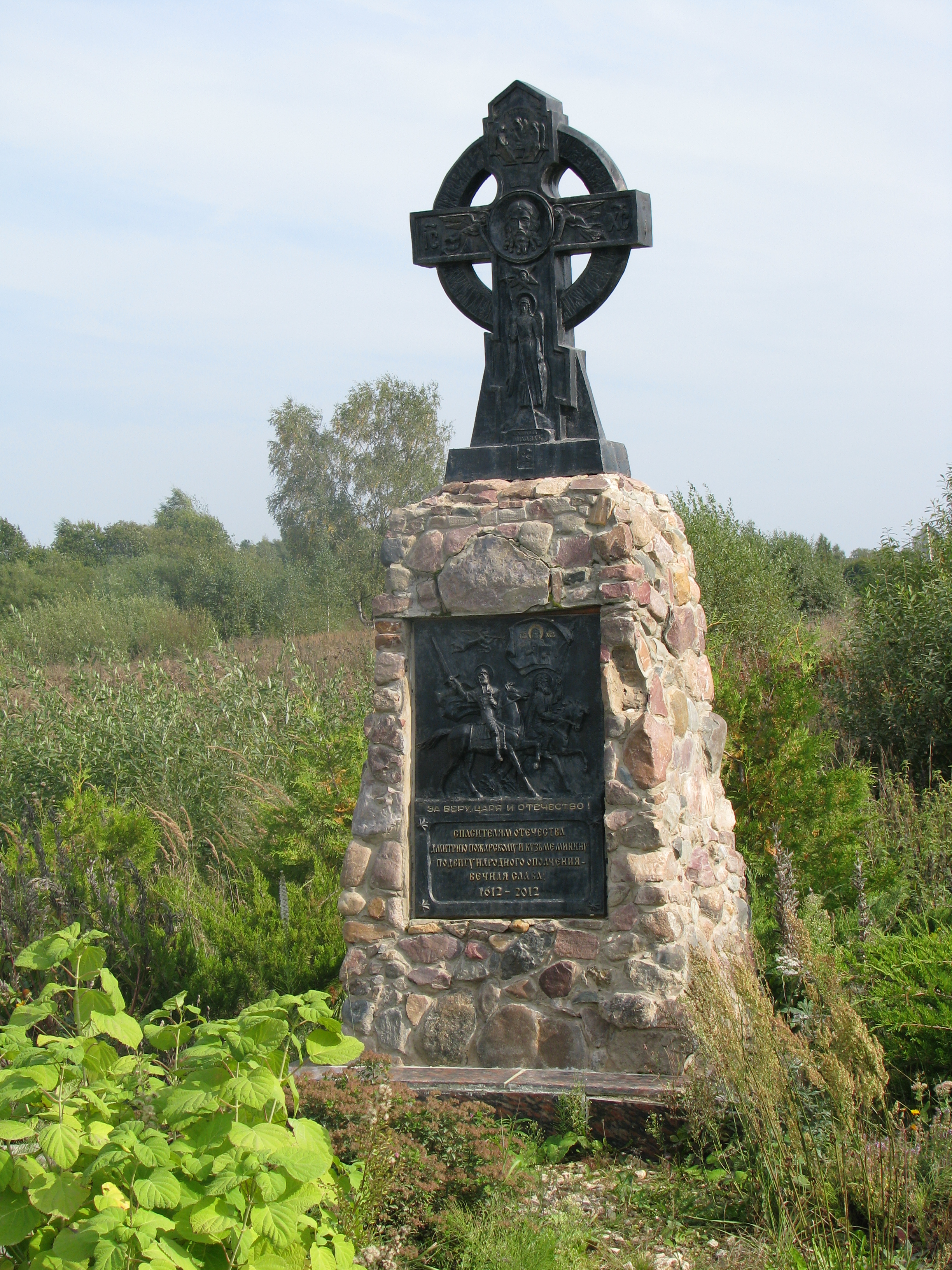 Памятное место в селе Мугрееве-Никольском, где был на лечении в 1611 году князь Дмитрий Пожарский. Мугреево-Никольское, Южский район, Ивановская область